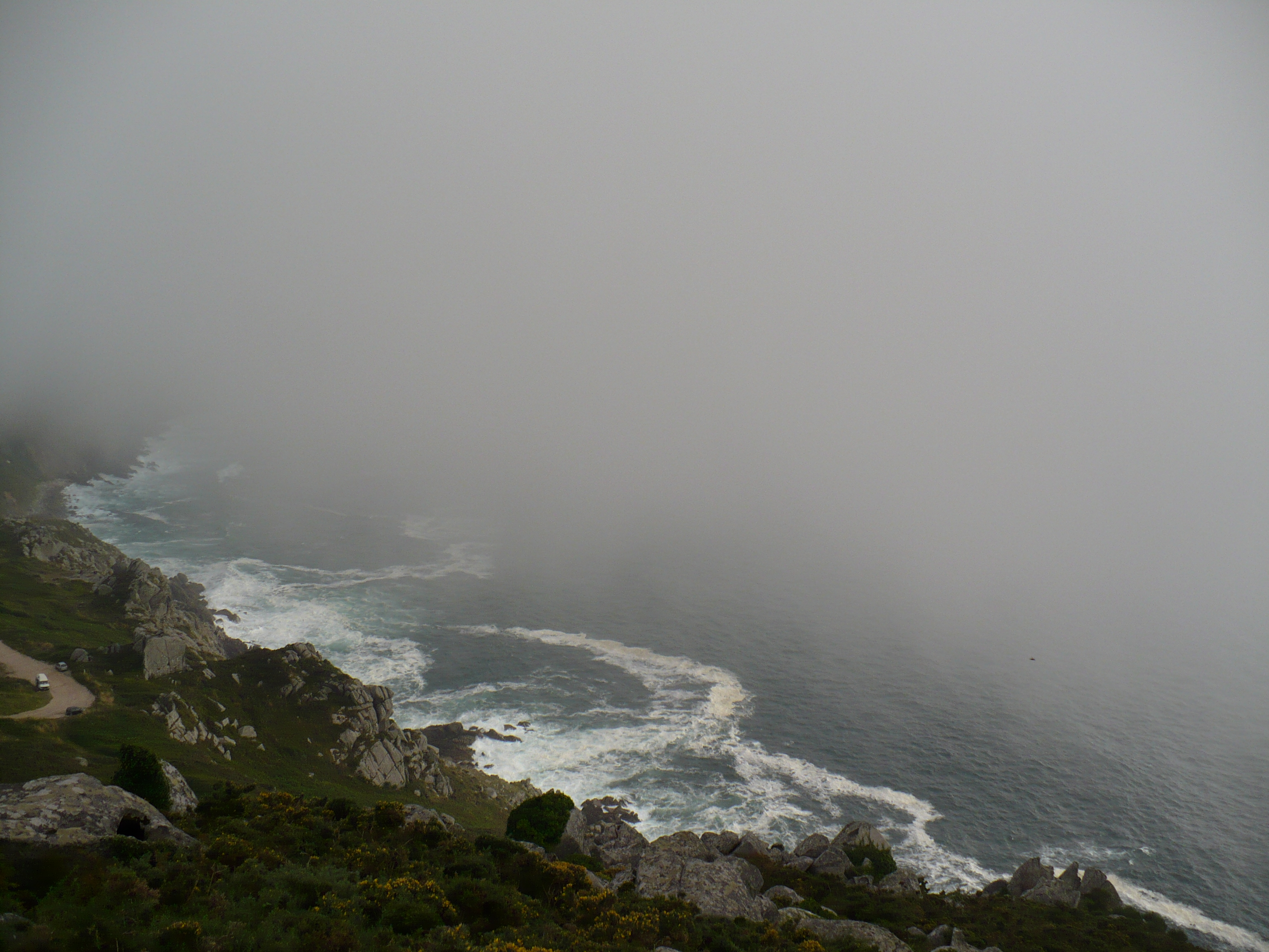 Fotografía da costa da Vela tomada dende o alto do Facho, en Dónon. A brétema sube dende o mar